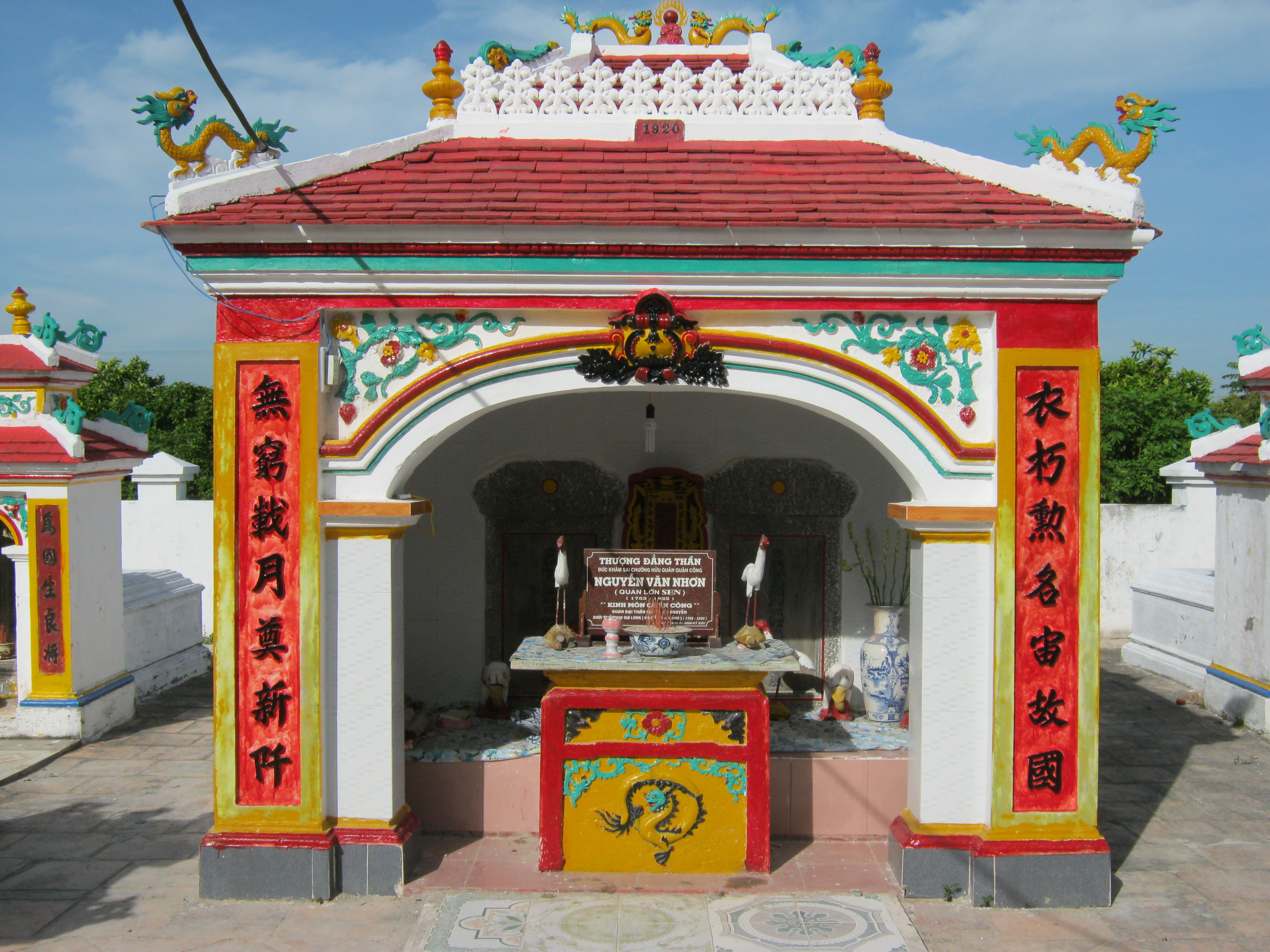 Ngôi mộ hiện nay của tướng Nguyễn Văn Nhơn (phải ảnh) và vợ tại ấp Đông Quới, xã Tân Khánh Đông, thị xã Sa Đéc, Đồng Tháp, Việt Nam.